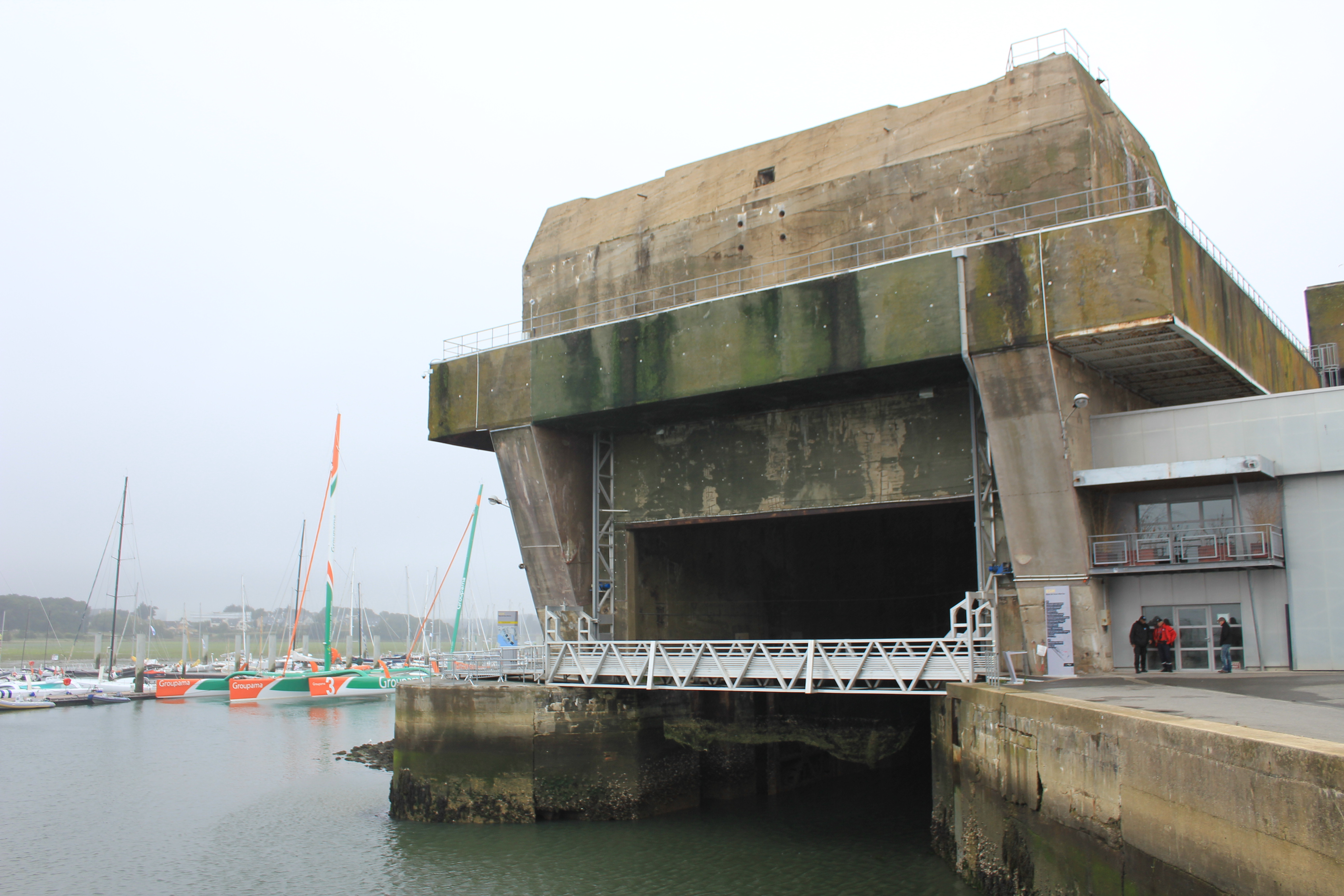 Dor ar slipway e blok Keroman I, e bazenn soumarined Ingénieur Général Stosskopf, An Oriant, Breizh.